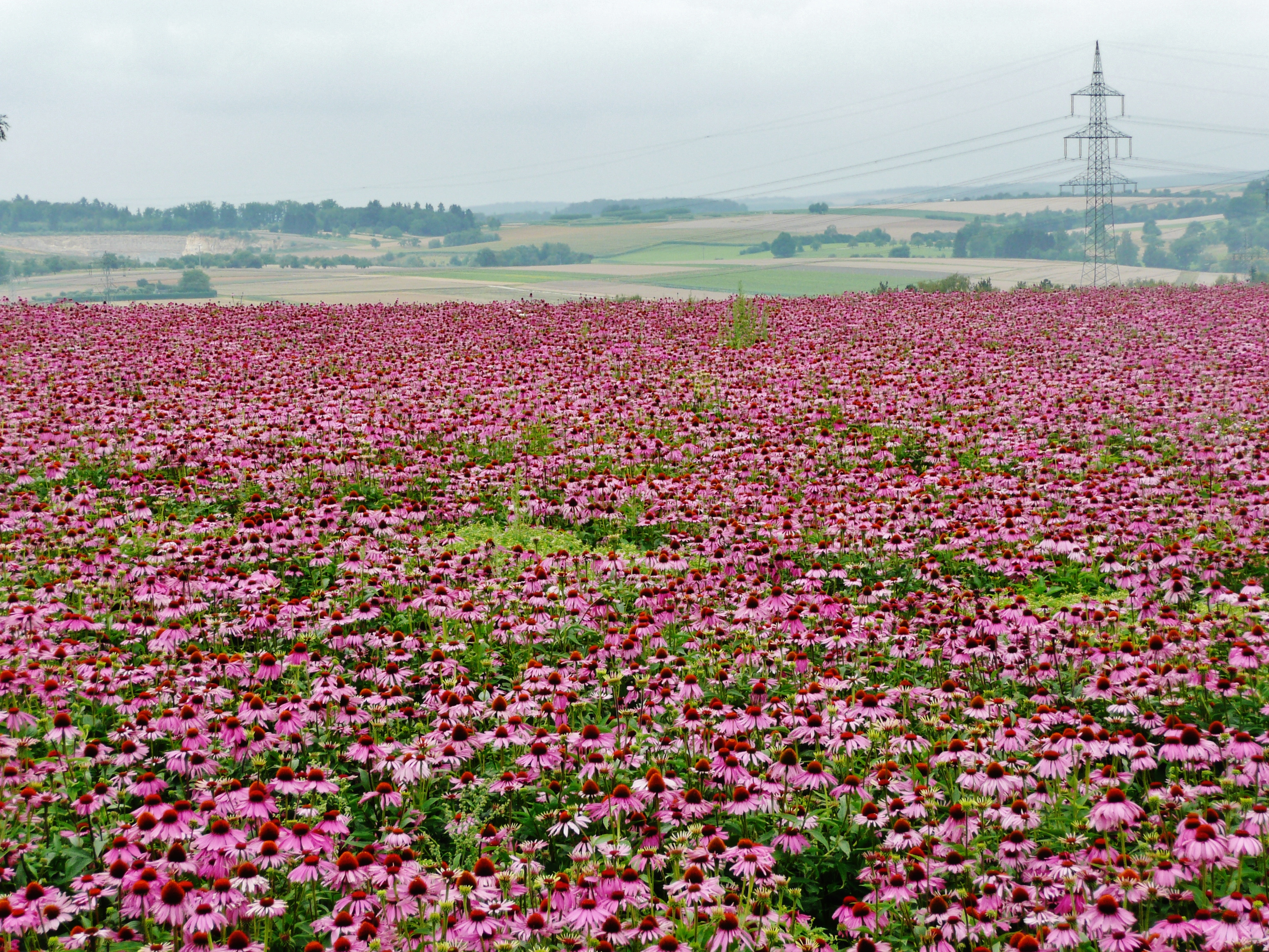 Feld Echinacea purpurea, Blick Richtung Süden bei Magstadt